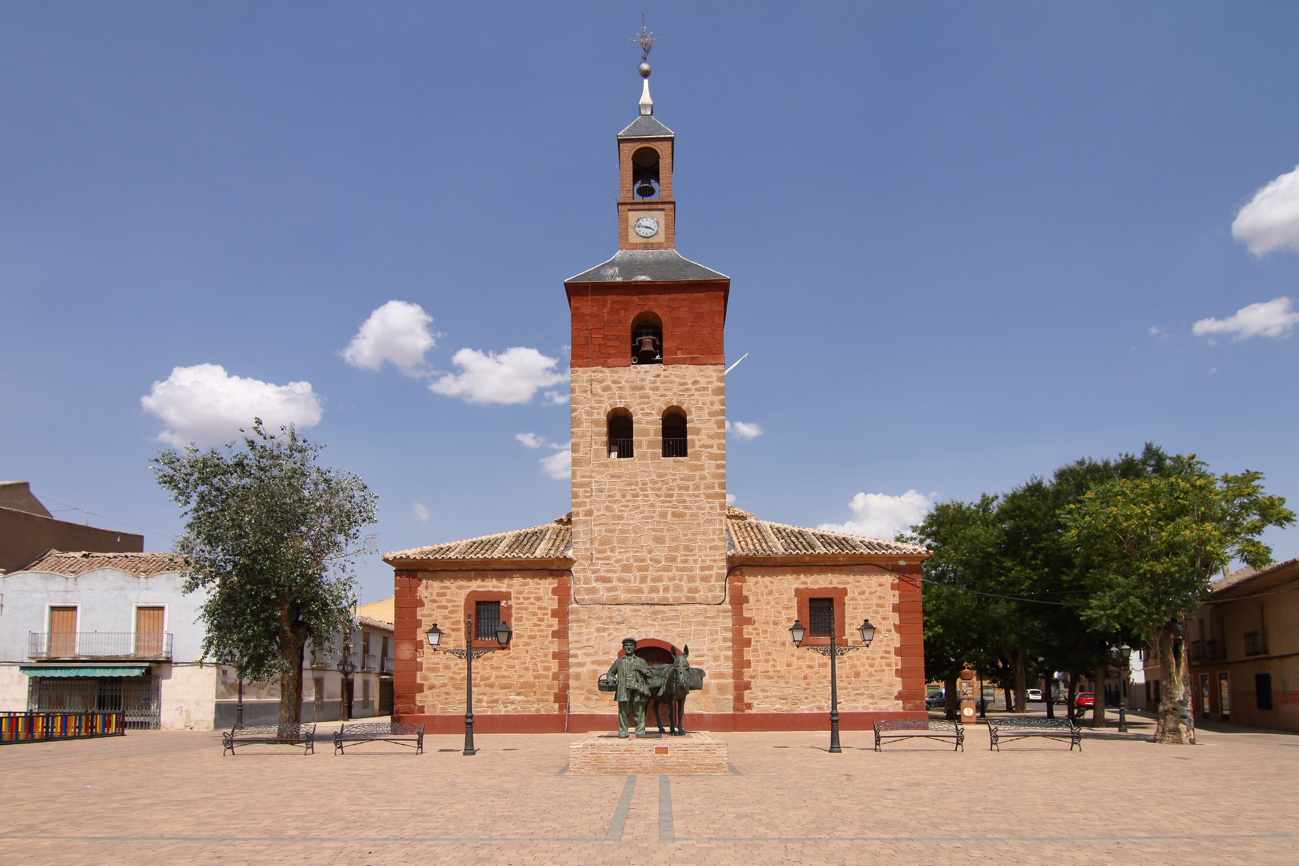 Villafranca de los Caballeros, Iglesia de Nuestra Señora de la Asunción, fachada principal